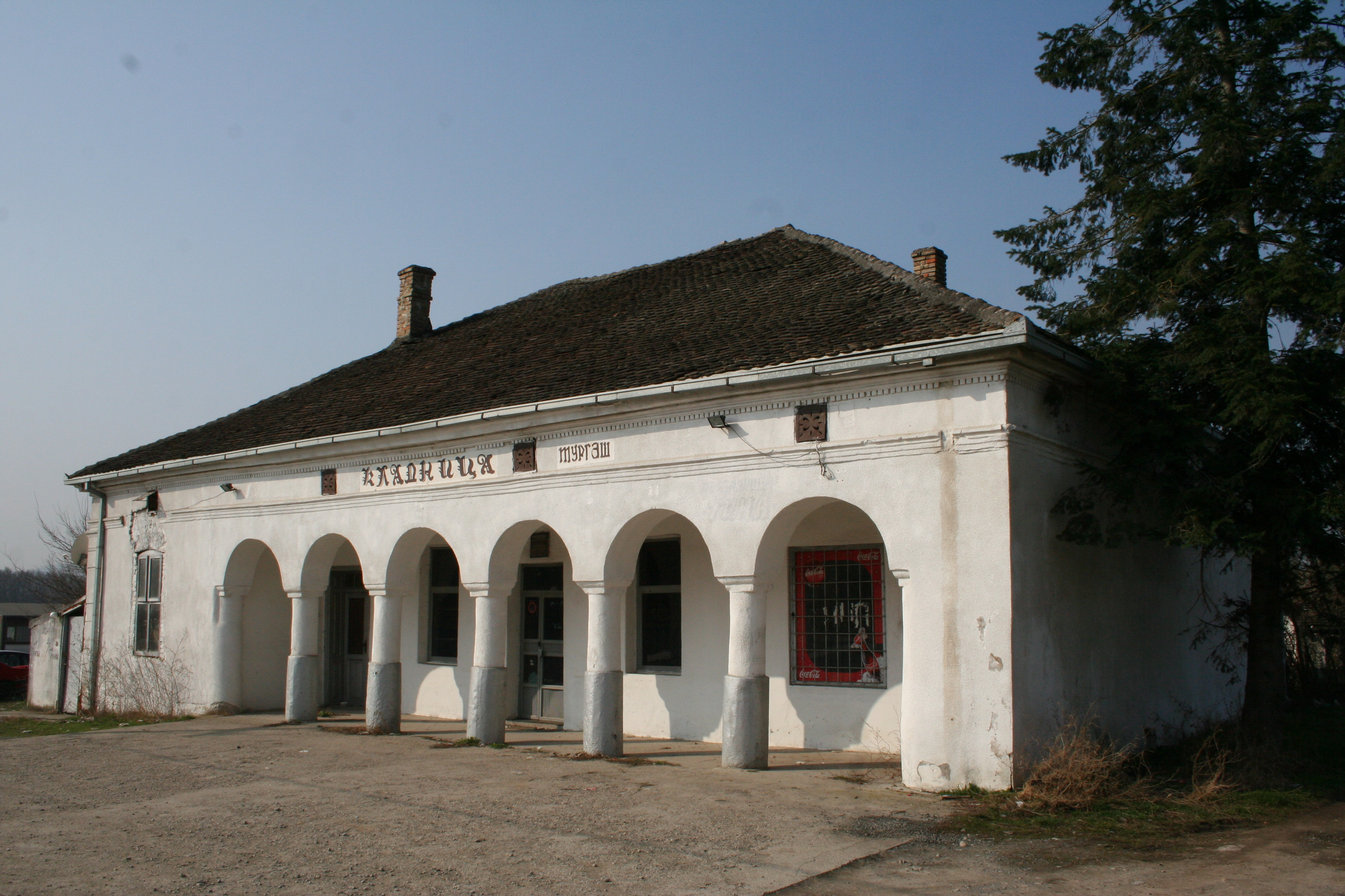 Đidina kafana